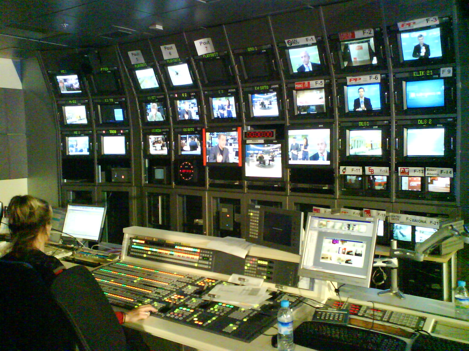 Programa electoral correspondiente a las elecciones del 9 de marzo a las Cortes Españolas en Euskal Telebista.